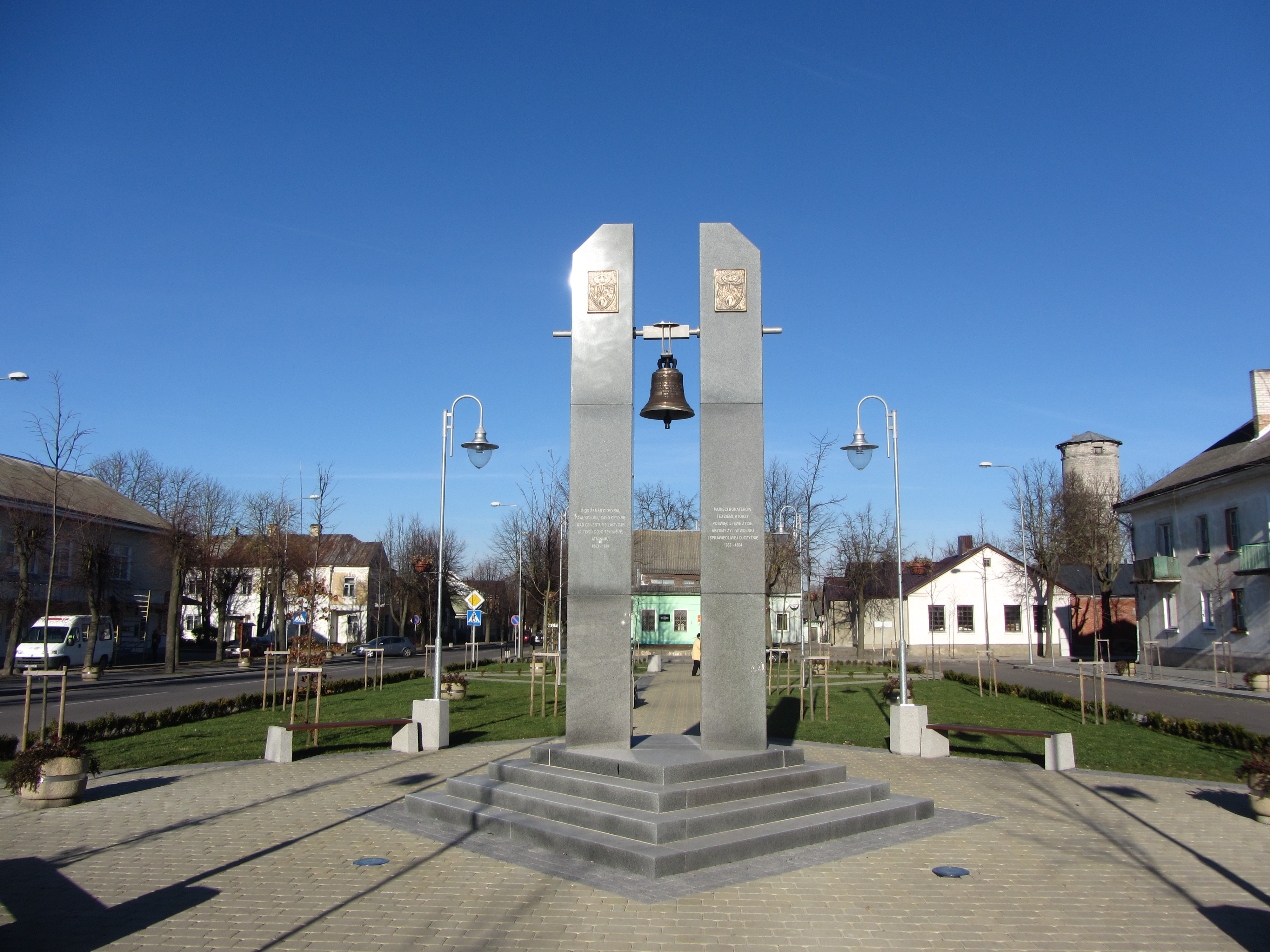 Eišiškės, Lithuania